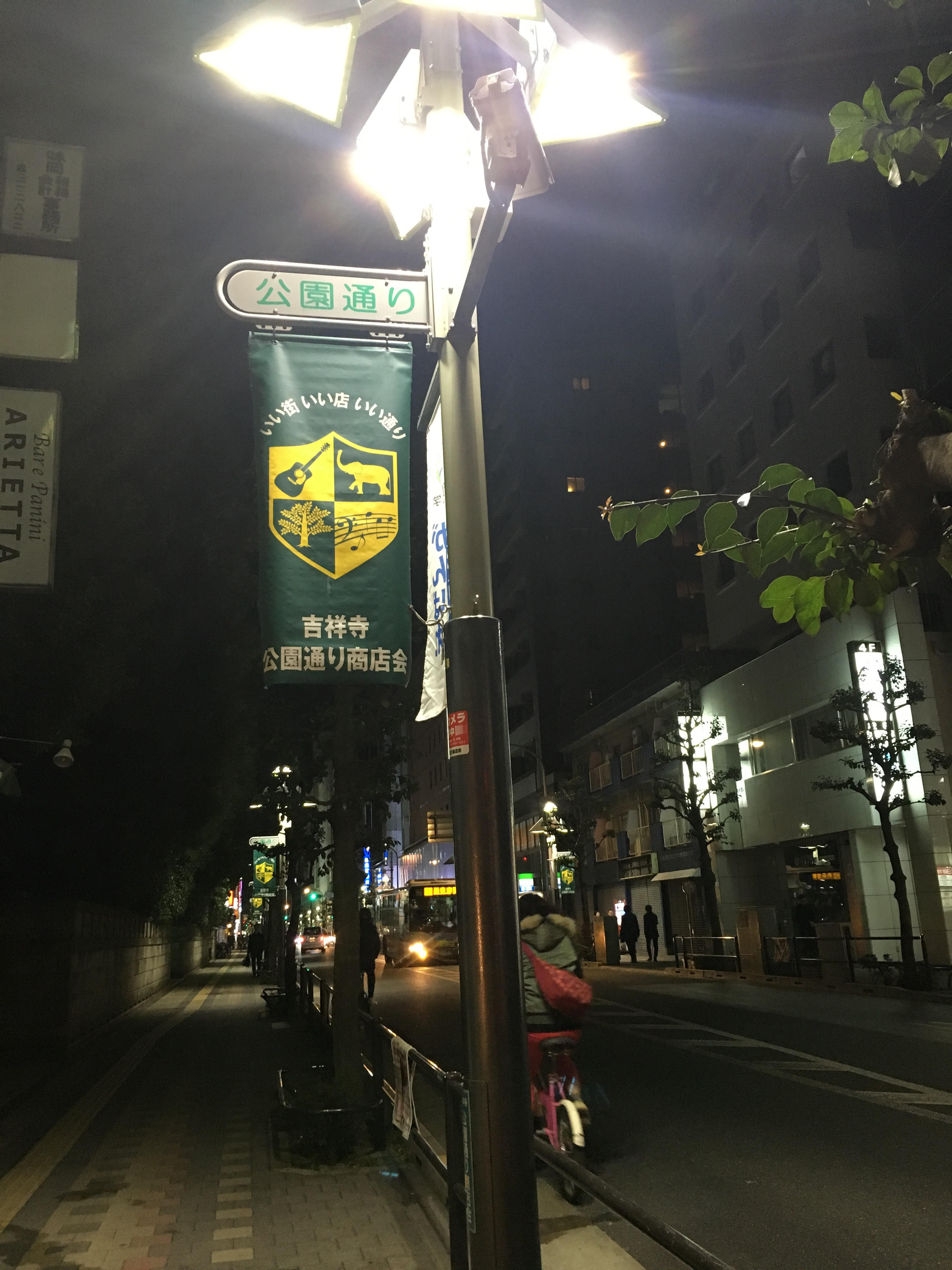 吉祥寺の公園通りにある街灯